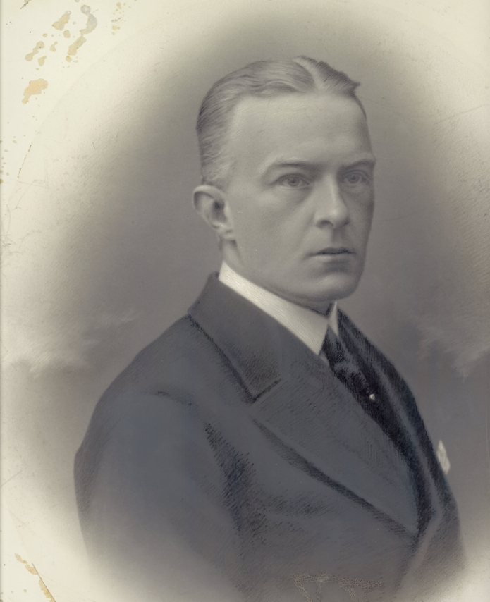 Ferdinand Francois baron de Smeth - tijdens burgemeestersschap Ferwerderadeel